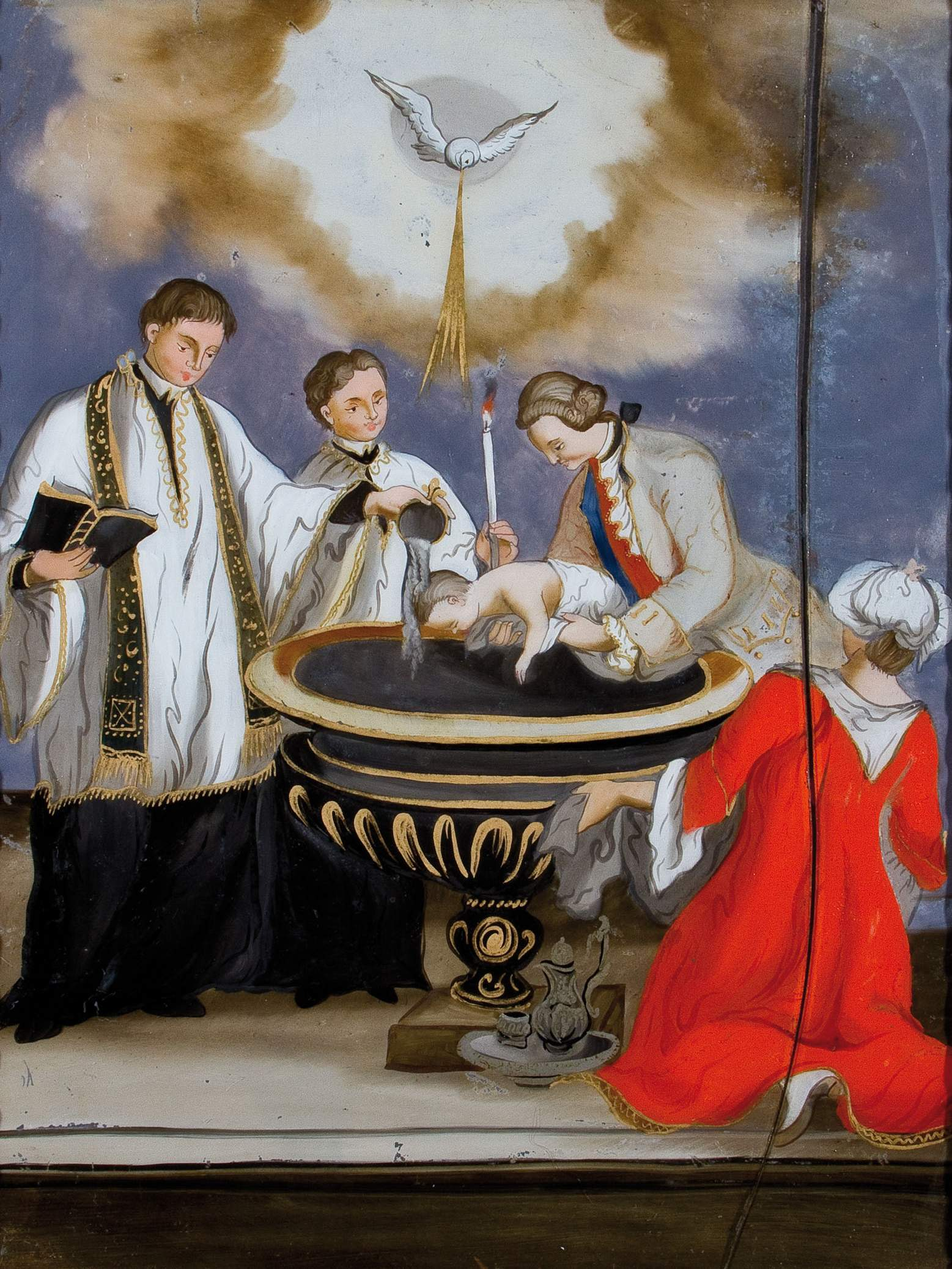 Taufe (aus einem Satz von sieben Hinterglasbildern mit den heiligen Sakramenten), Hinterglasbild, 44 x 35 cm, 2. Drittel 19. Jh.